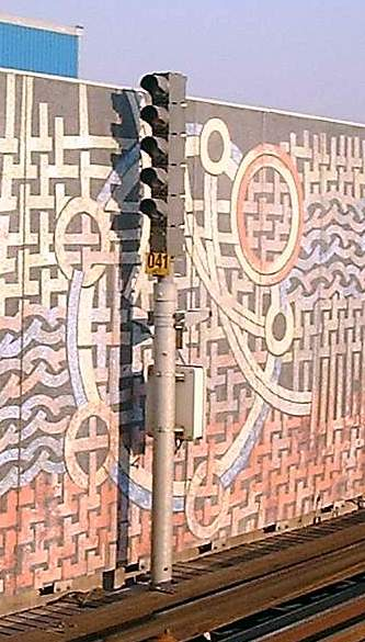 Terrazzo wall at Gamla stan metro station, Stockholm.